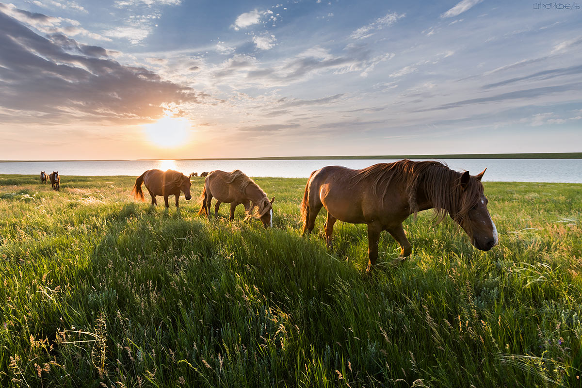 Ростовский заповедник: в центральной части Кума-Манычской впадины, к северу от оз. Маныч-Гудило, в Орловском и Ремонтнеском районах Ростовской области, Орловский район, Ремонтненский район, Ростовская область This image is related to the protected area of Russia number 6100108